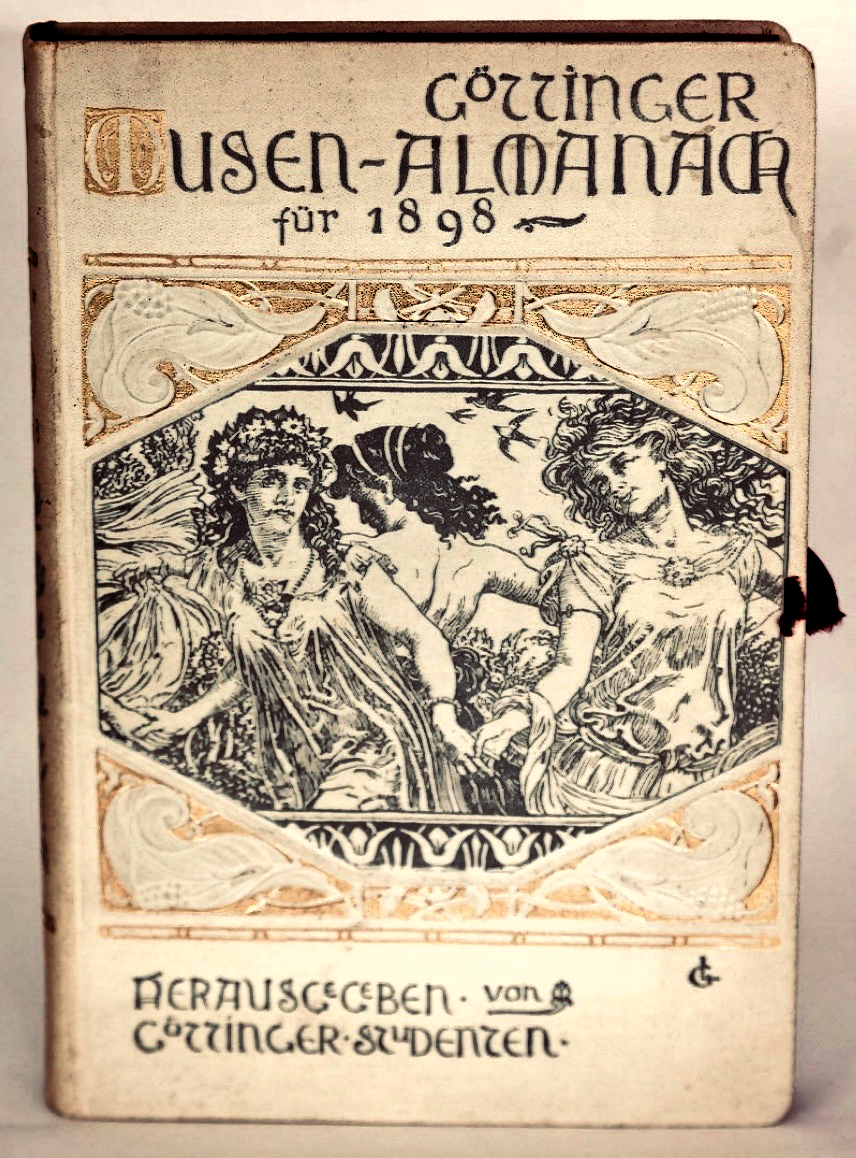 Göttinger Musen-Almanach für 1896. Herausgegeben von Göttinger Studenten, erschienen im Verlag Lüder Horstmann, Göttingen 1898.